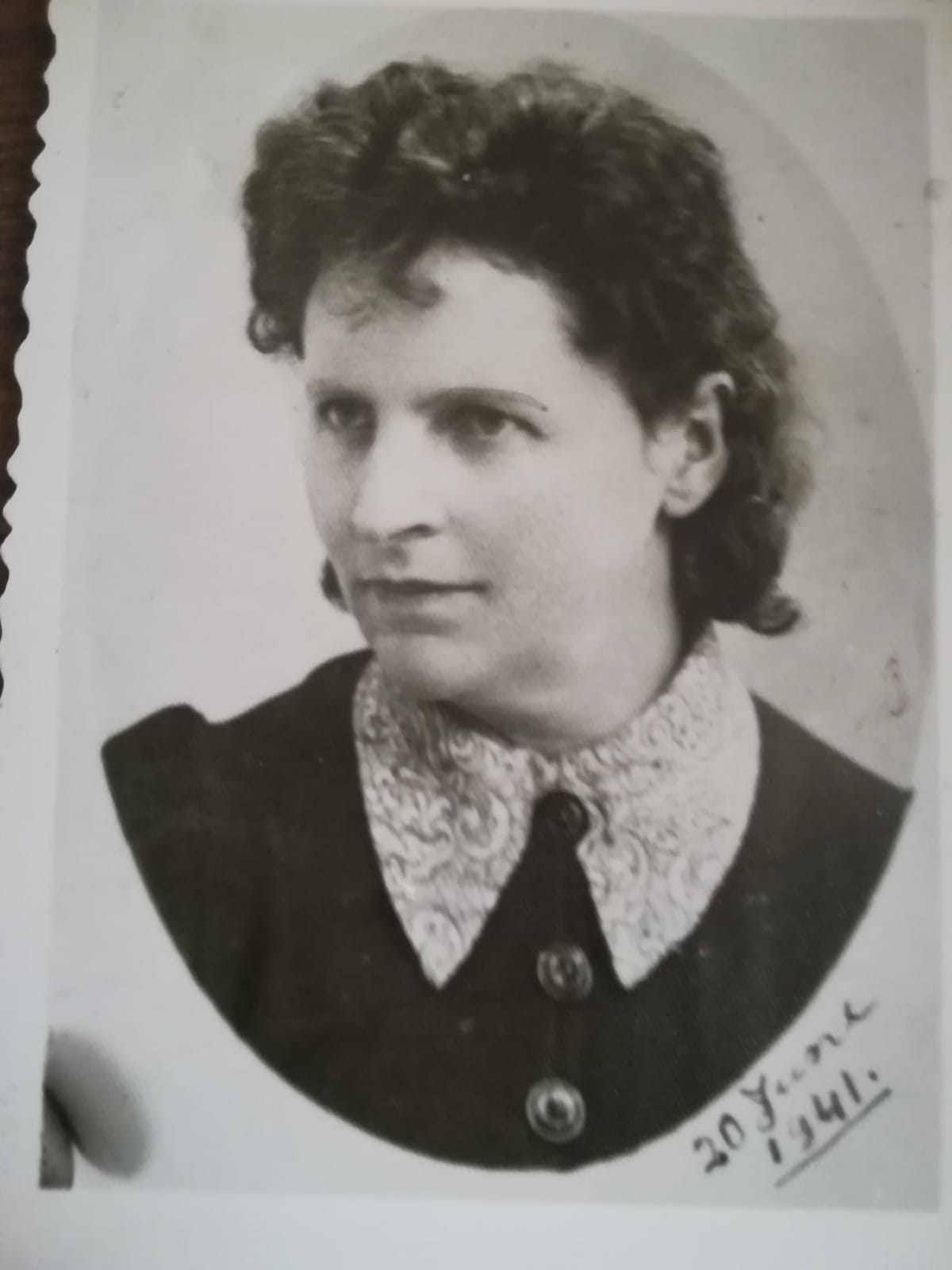 גולדה סטבורובסקי – אימו של מנדל סטבורובסקי, צולם בשנת 1941